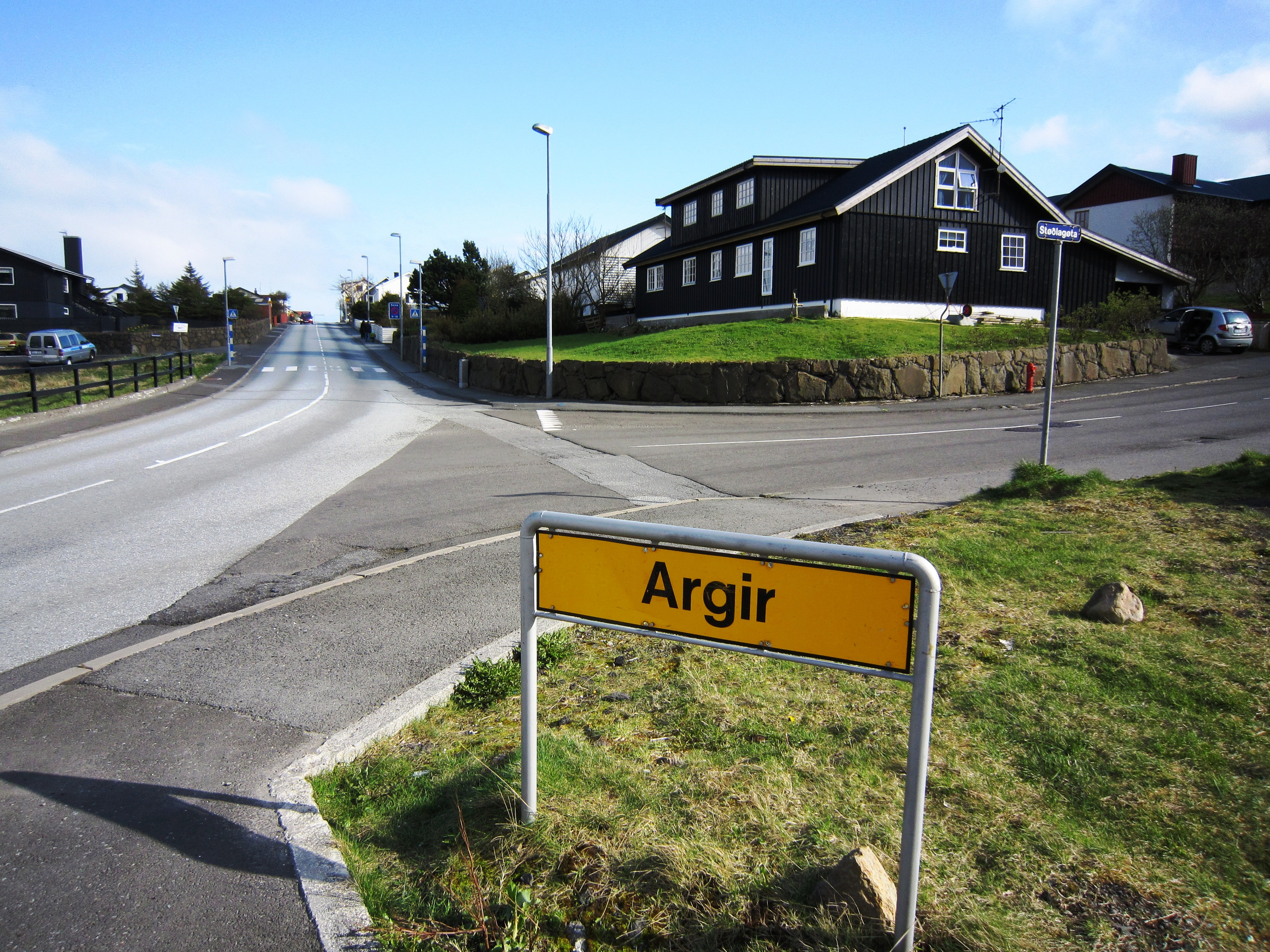 Argir på Færøyene.